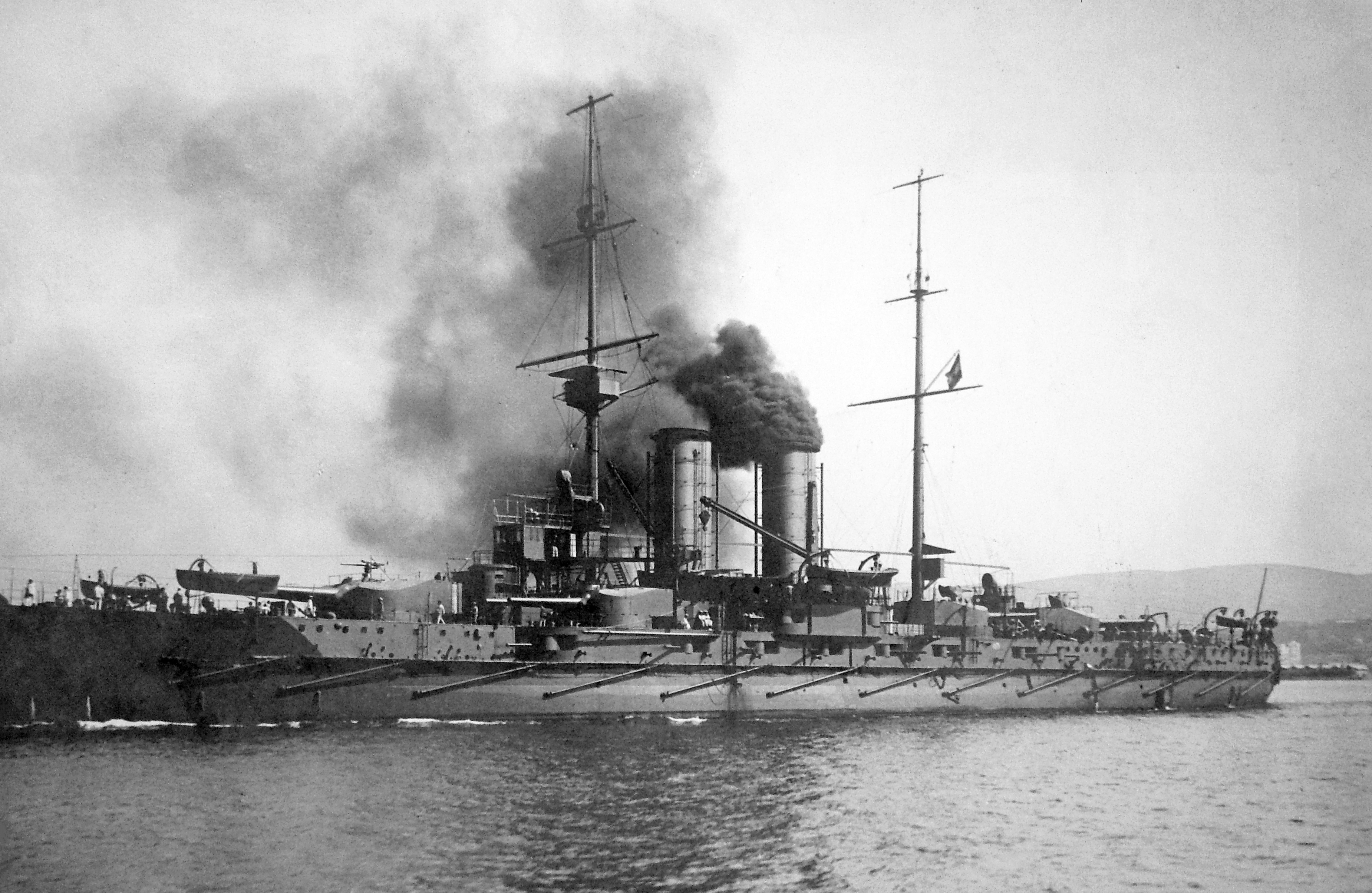 SMS Zrínyi, Radetzky osztályú csatahajó. Location: Adriatic Sea Tags: First World War, warship, His Majesty's ship Zrínyi, ordnance, smoke Title: SMS Zrínyi, Radetzky osztályú csatahajó.